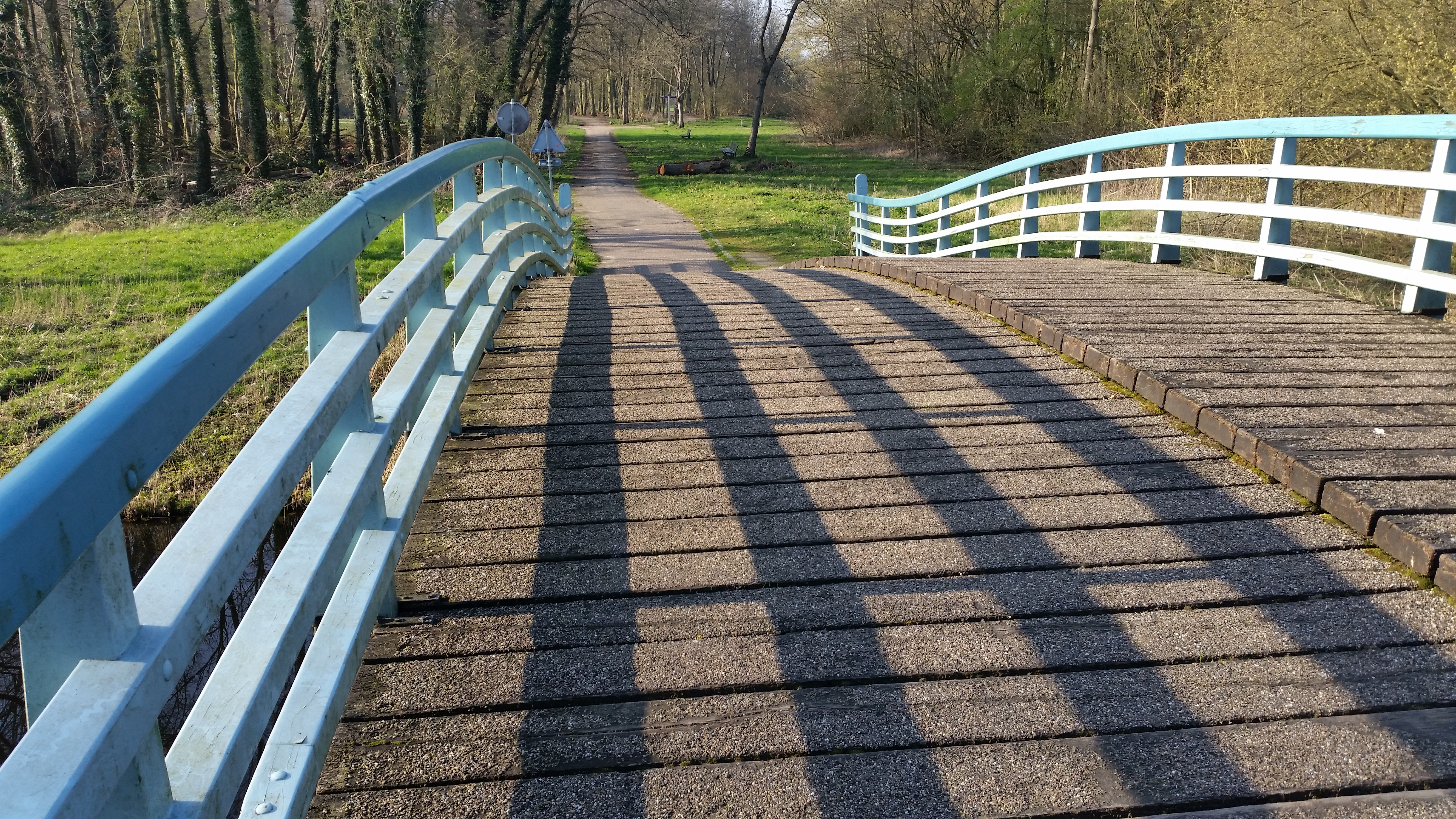 Brug 556 (in Amsterdam)